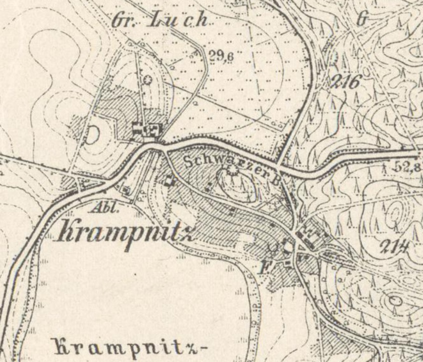 Krampnitz auf dem Messtischblatt 3544 Potsdam-Nord von 1903 (Aufnahme 1901). F. = Försterei. Das Gehöft unterhalb des Schriftzuges Gr. Luch gehörte zur Domäne Fahrland.